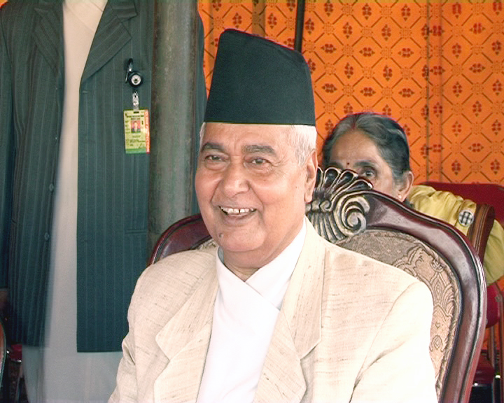 नेपाली: नेपालको प्रथम उपराष्ट्रपति